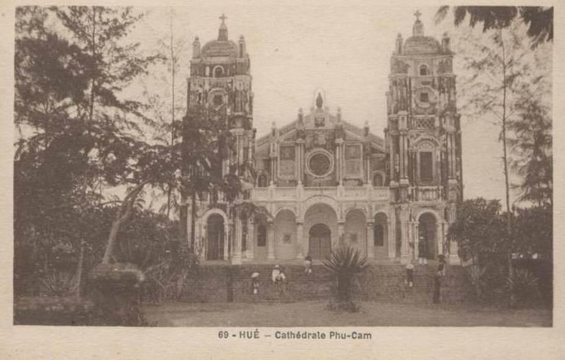 Nhà thờ Phú Cam trước đây